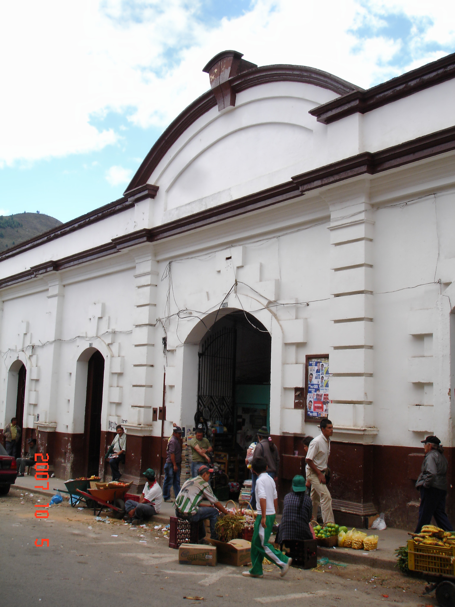 Edificio del Mercado Público de Pamplona Pamplona